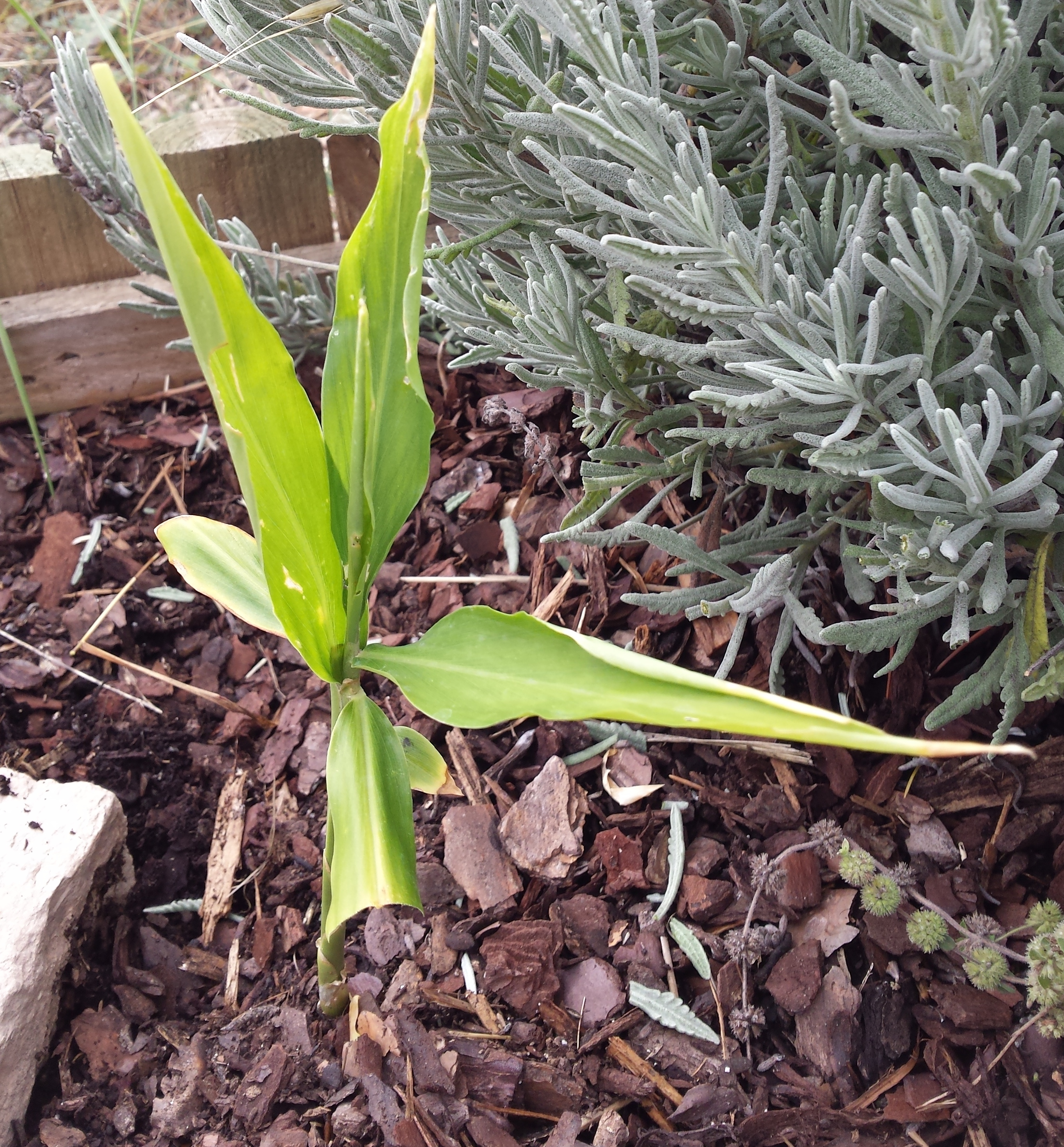 Brot de gingebre (Zingiber officinale) cultivat a Catelltallat, al costat d'un espígol